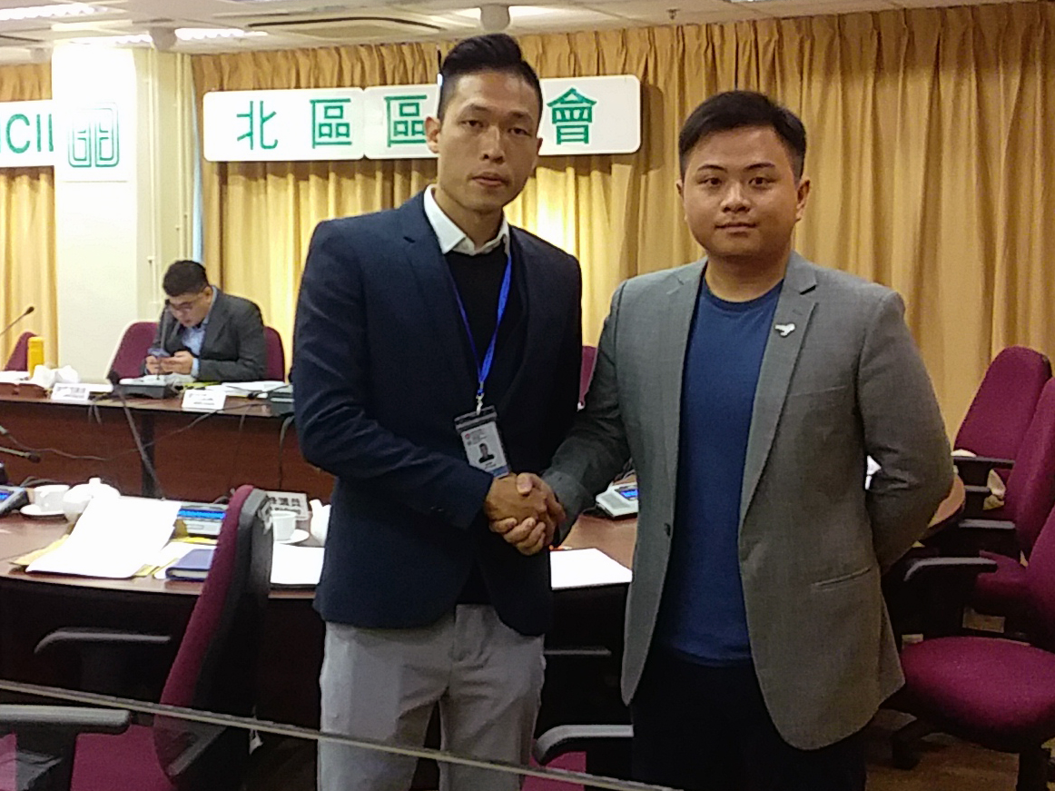 2020年1月7日，香港特別行政區第六屆北區區議會於舉行第一次會議並由議員互選正副主席職位，羅庭德（左）及陳旭明（右）分別獲選為正副主席。